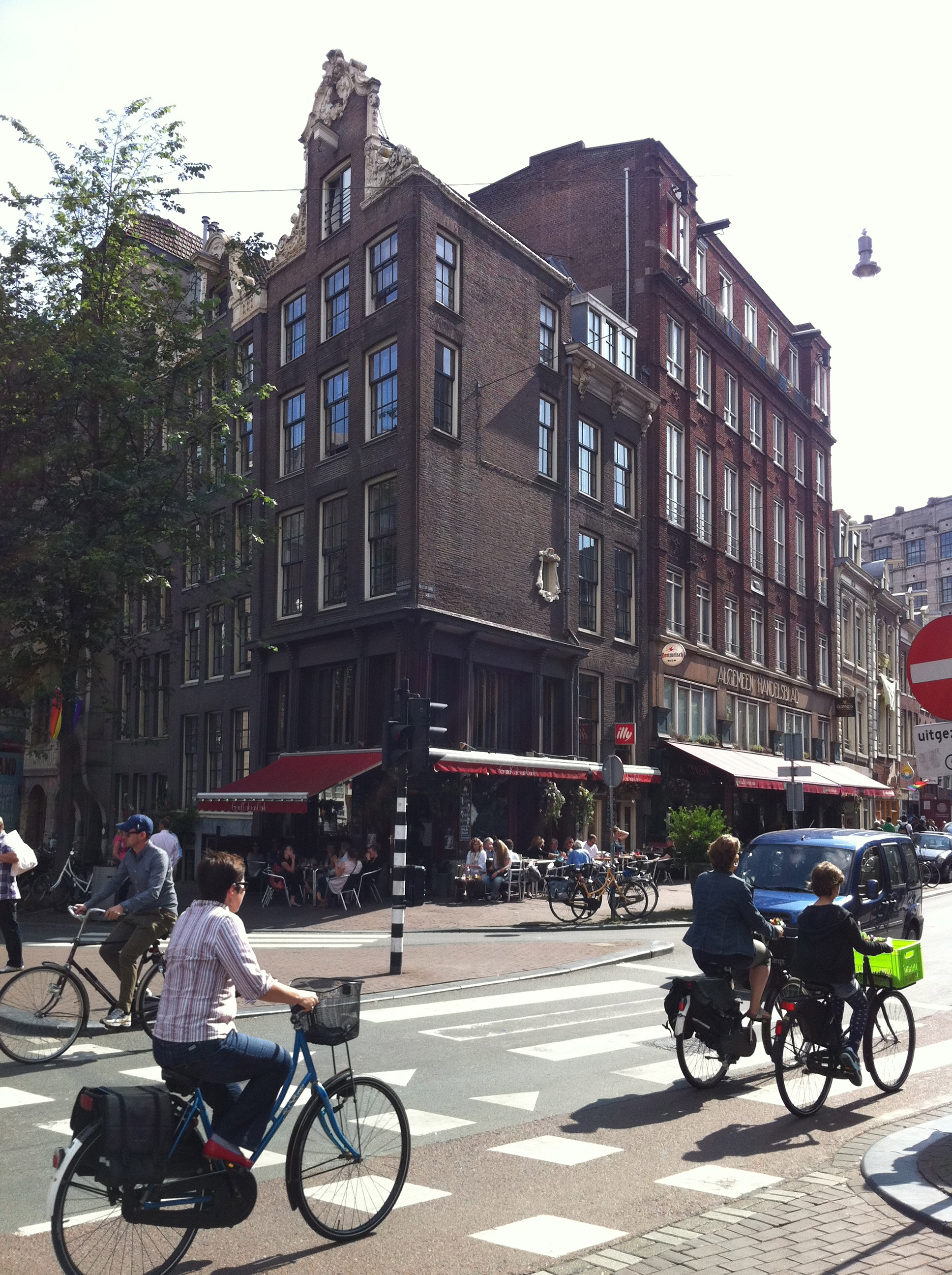 Hoek Nieuwezijds Voorburgwal / Paleisstraat Amsterdam, juli 2011